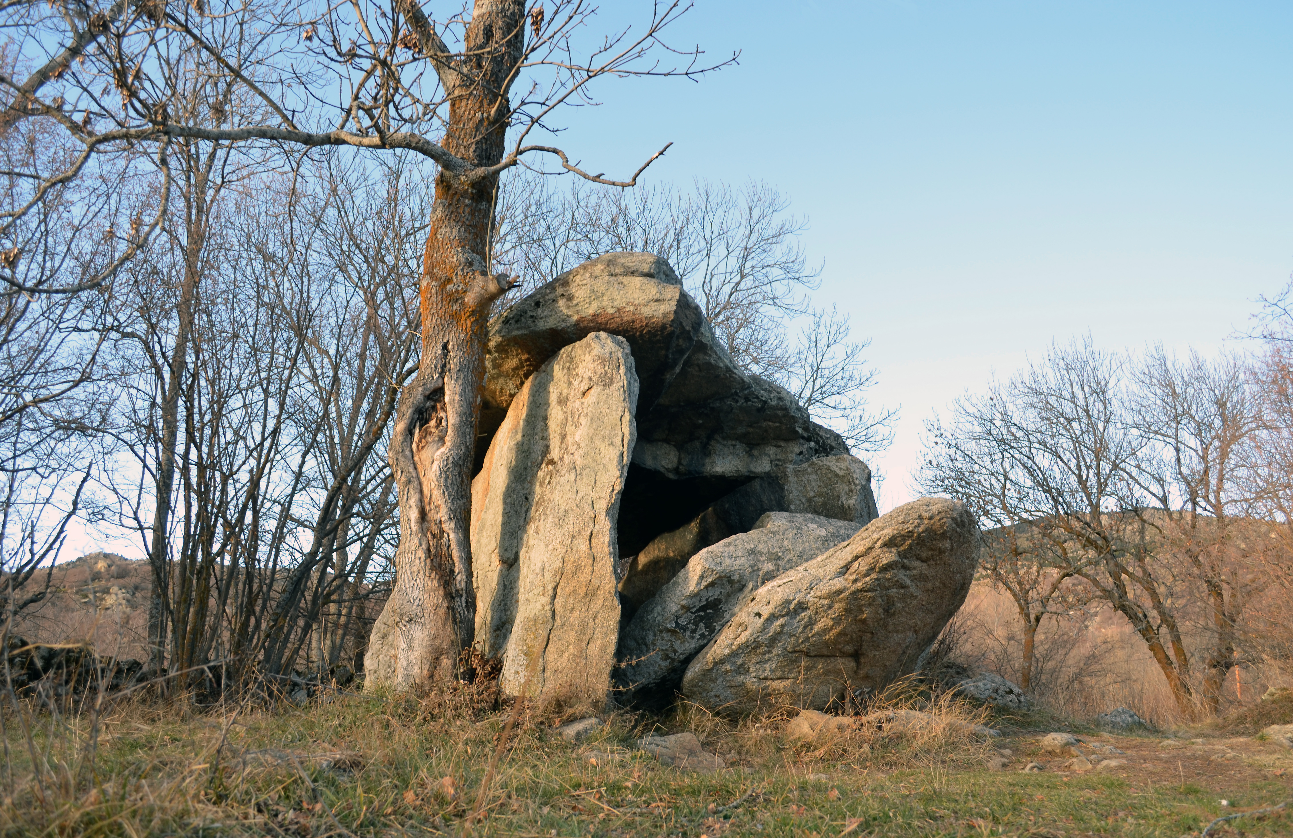 Dolmen de Bragoly ou Brangoli - Enveitg, Pyrénées-Orientales